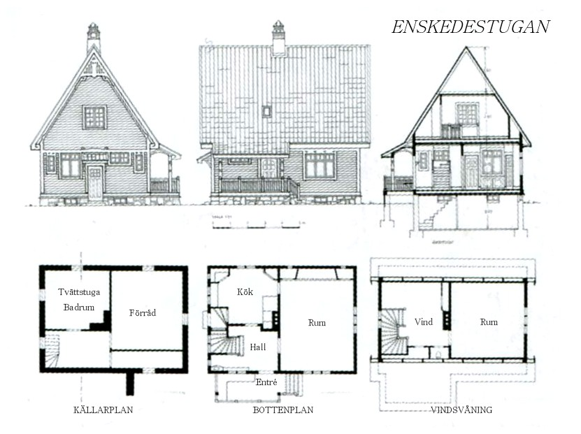 Den så kallade Enskedestugan uppfördes i Enskede trädgårdsstad i ett 20-tal exemplar mellan 1909-1910